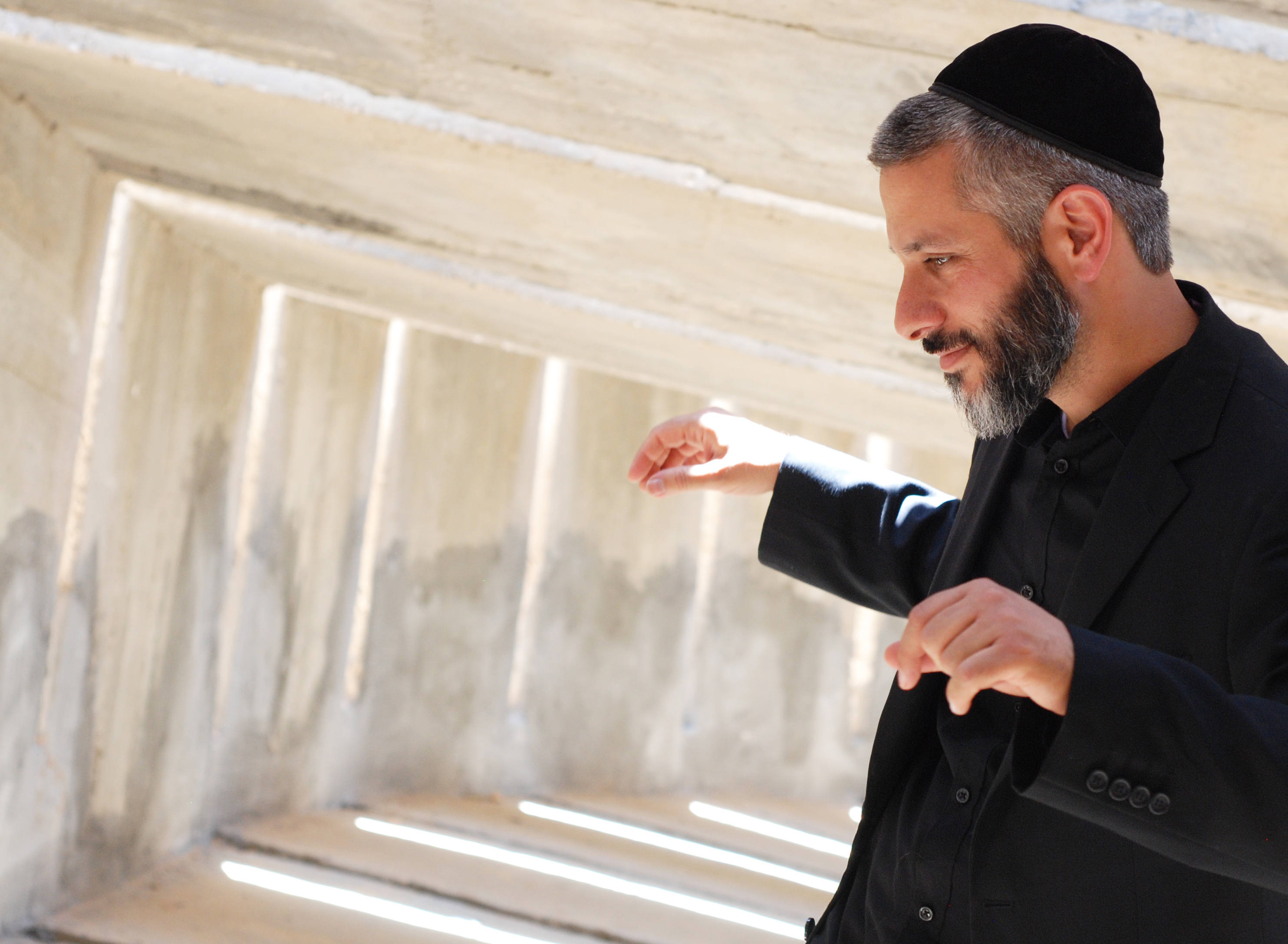 מתוך האלבום 'יפה כלבנה'